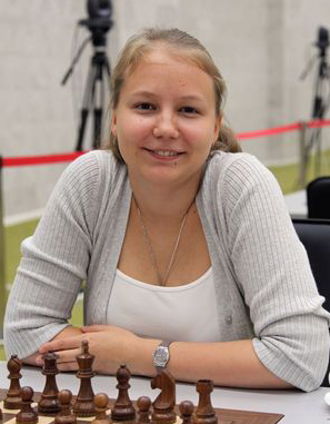 Валентина Гунина, Суперфинал чемпионата России по шахматам 2015